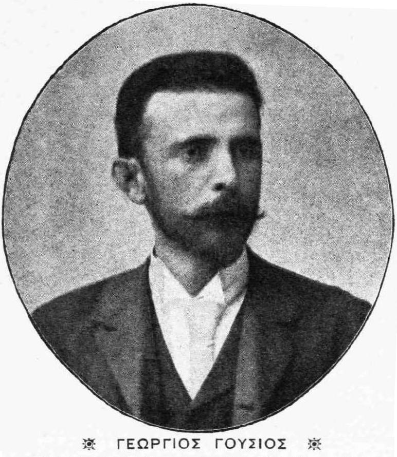 Griechischer Soldat, 19. Jahrhundert